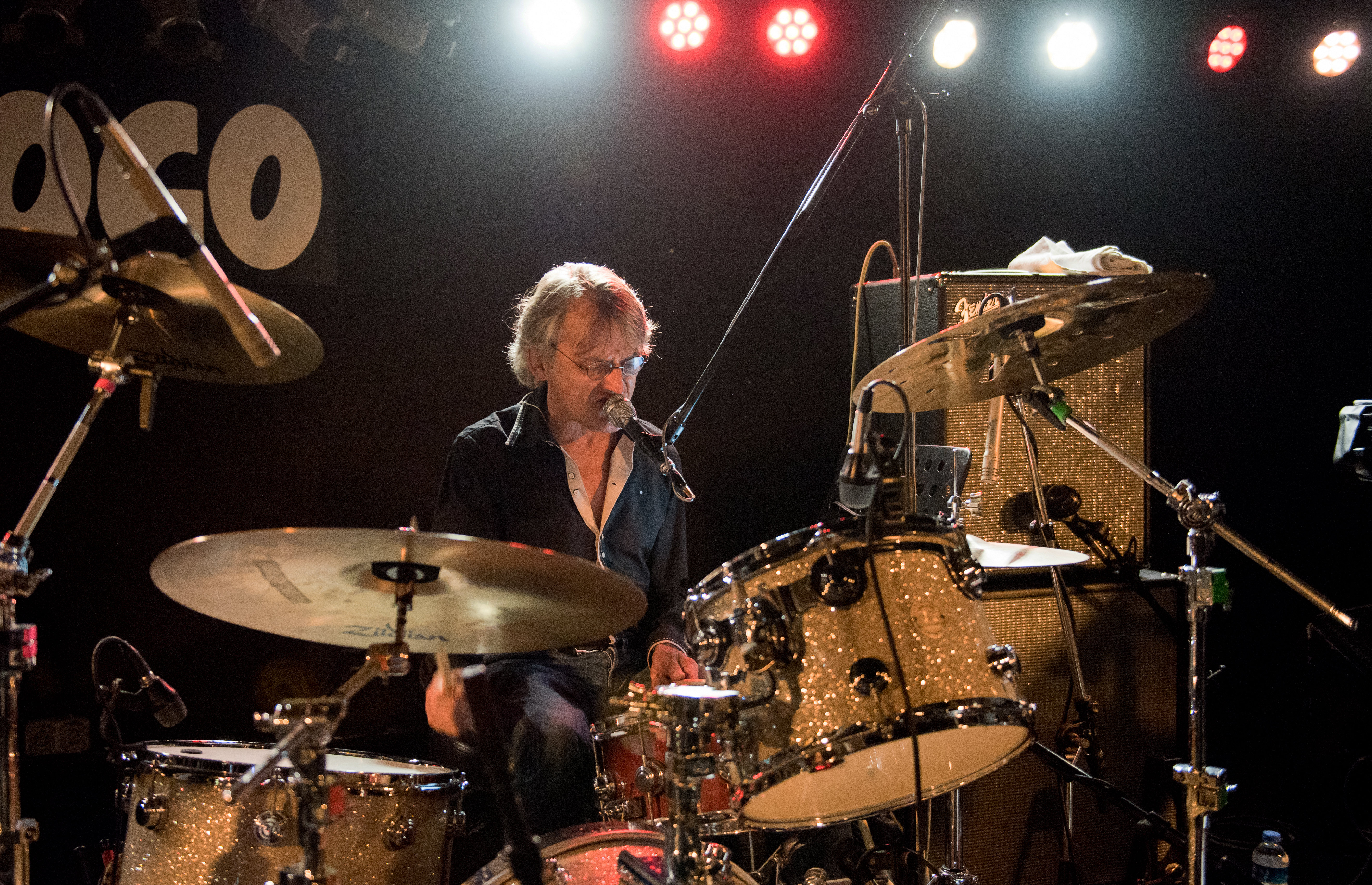 Zöller & Konsorten bei der Flucht nach vorn Tour 2016 im Logo Hamburg